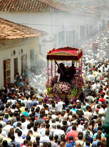 Una tradicion Mundial..